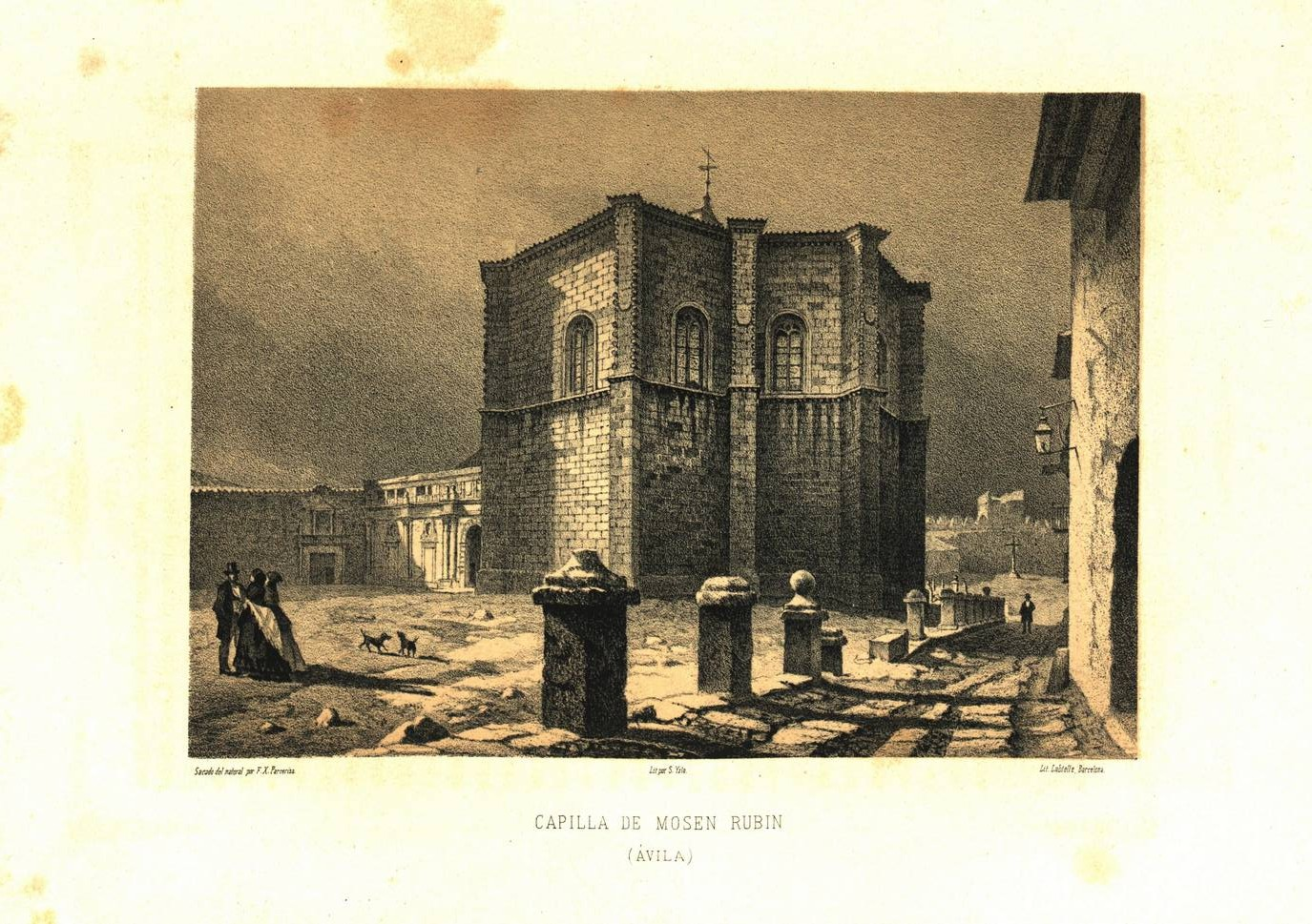 Grabado de Francisco Javier Parcerisa de la capilla de Mosén Rubí en Ávila, España, publicado en el año 1865.